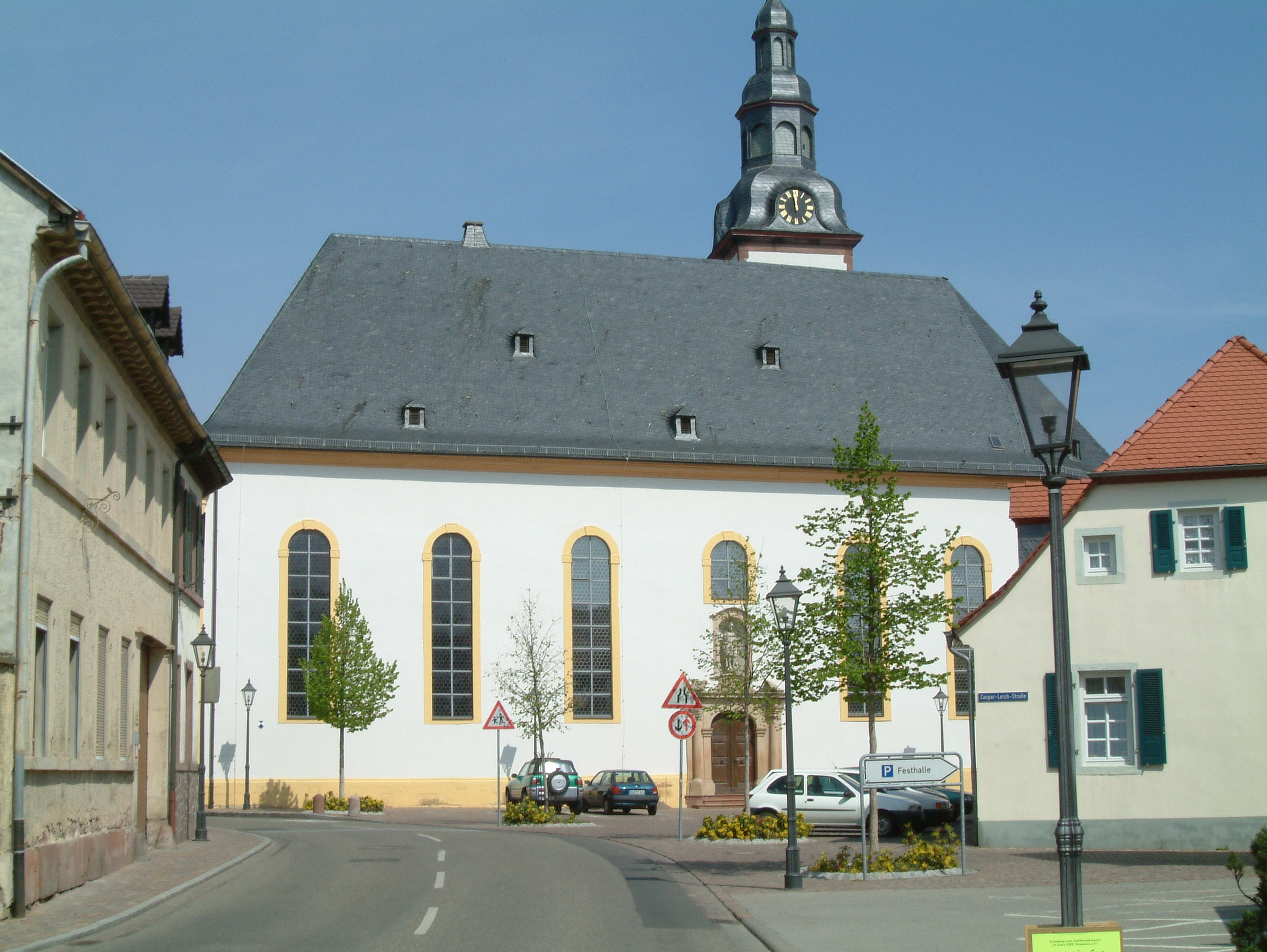 Laurentiuskirche (von Süden) zu Dirmstein, selbst fotografiert am 24.04.2006 und freigegeben durch Benutzer:Mundartpoet